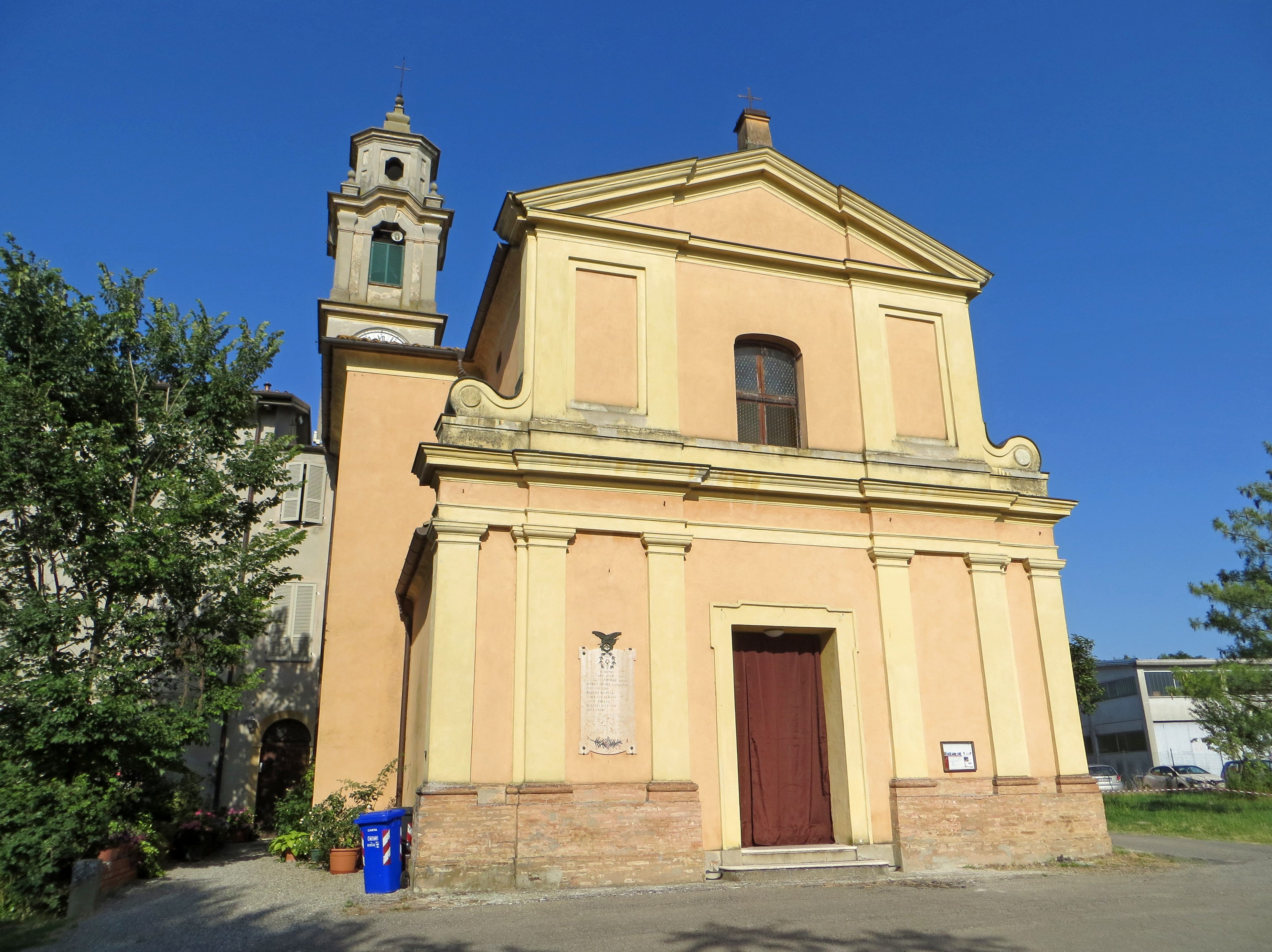 Chiesa di San Martino (San Martino Sinzano, Collecchio) - facciata e campanile